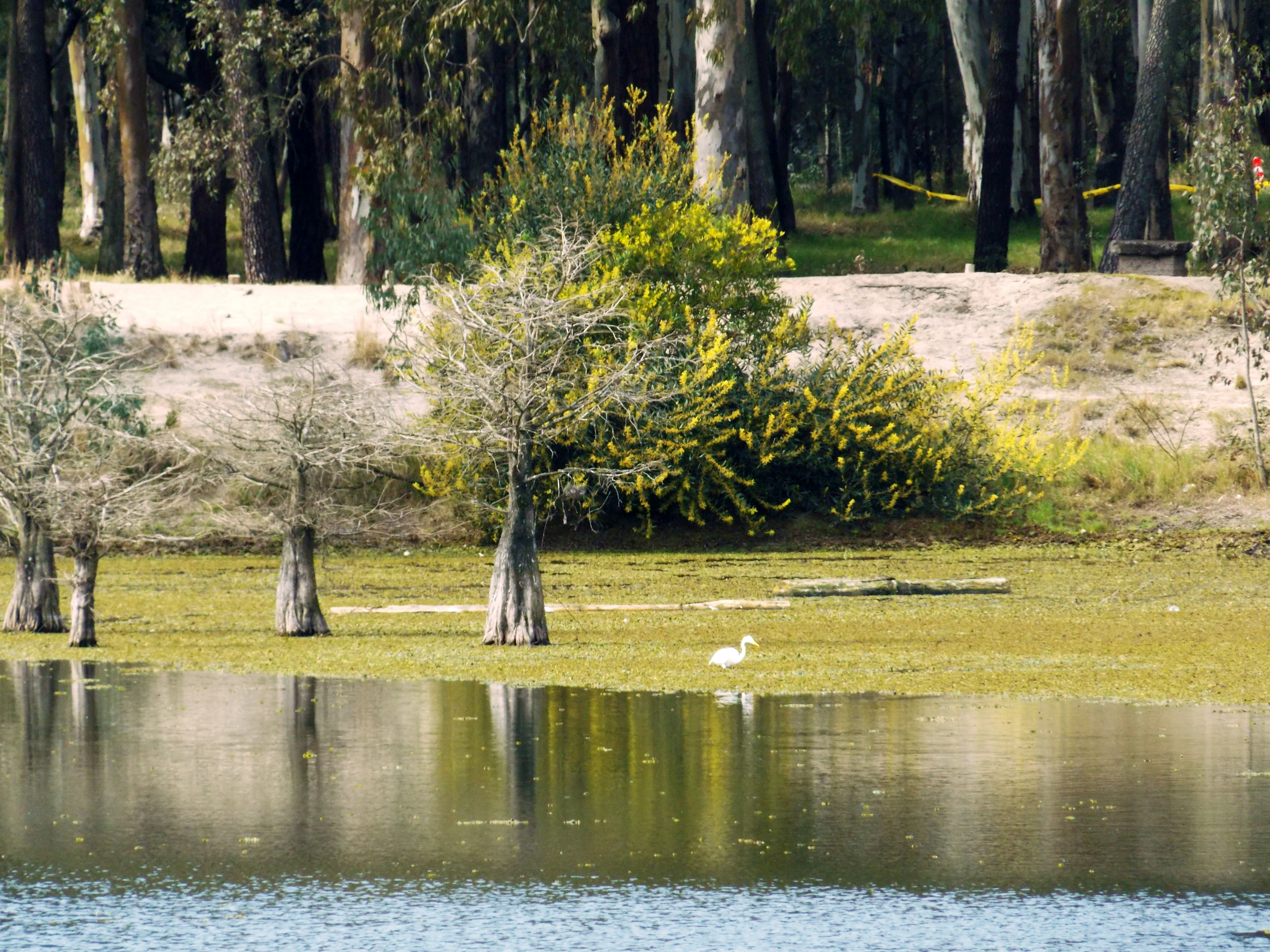 Parque Franklin Delano Roosevelt. Ubicada en el departamento de Canelones